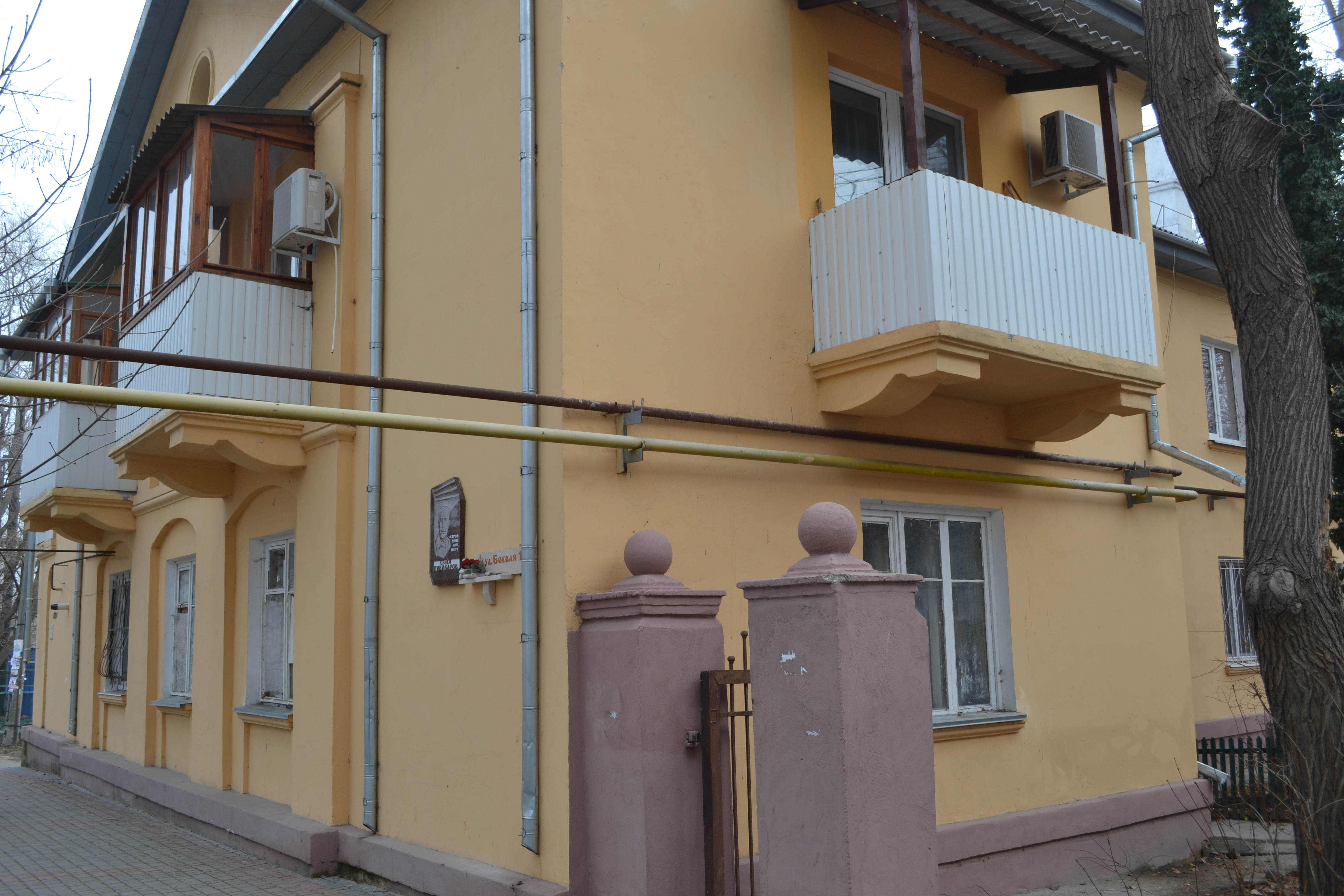 Дом в Феодосии, где жил поэт Семён Пивоваров